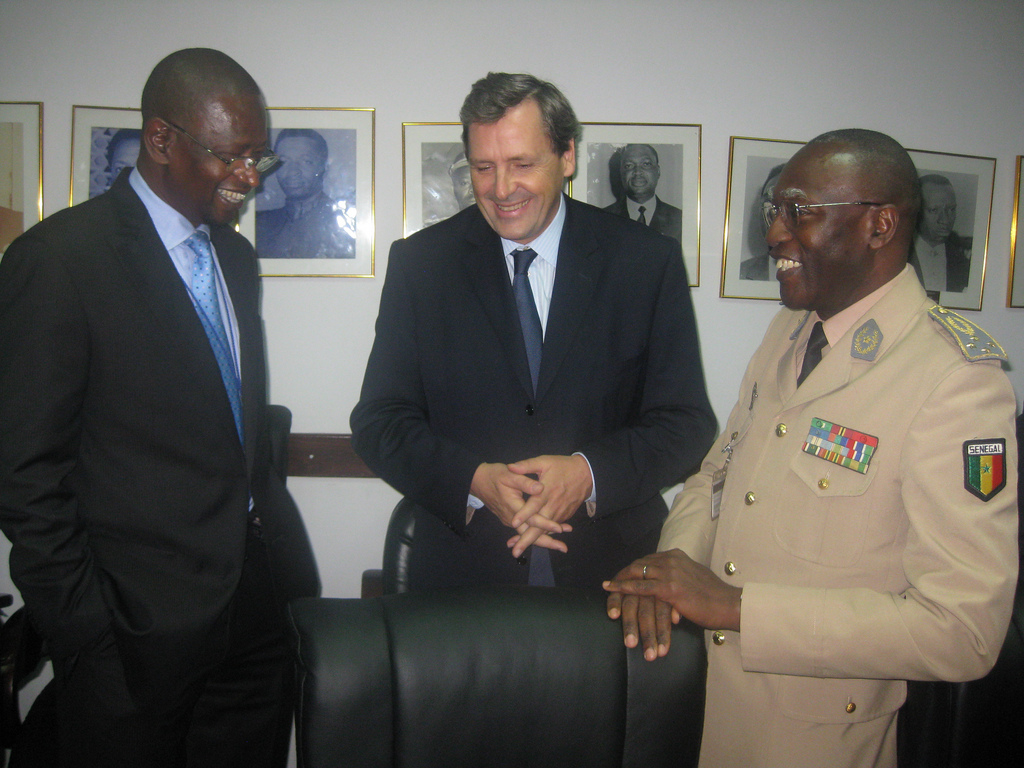 Alain Le Roy, diplomate au milieu et Général Gaye à droite